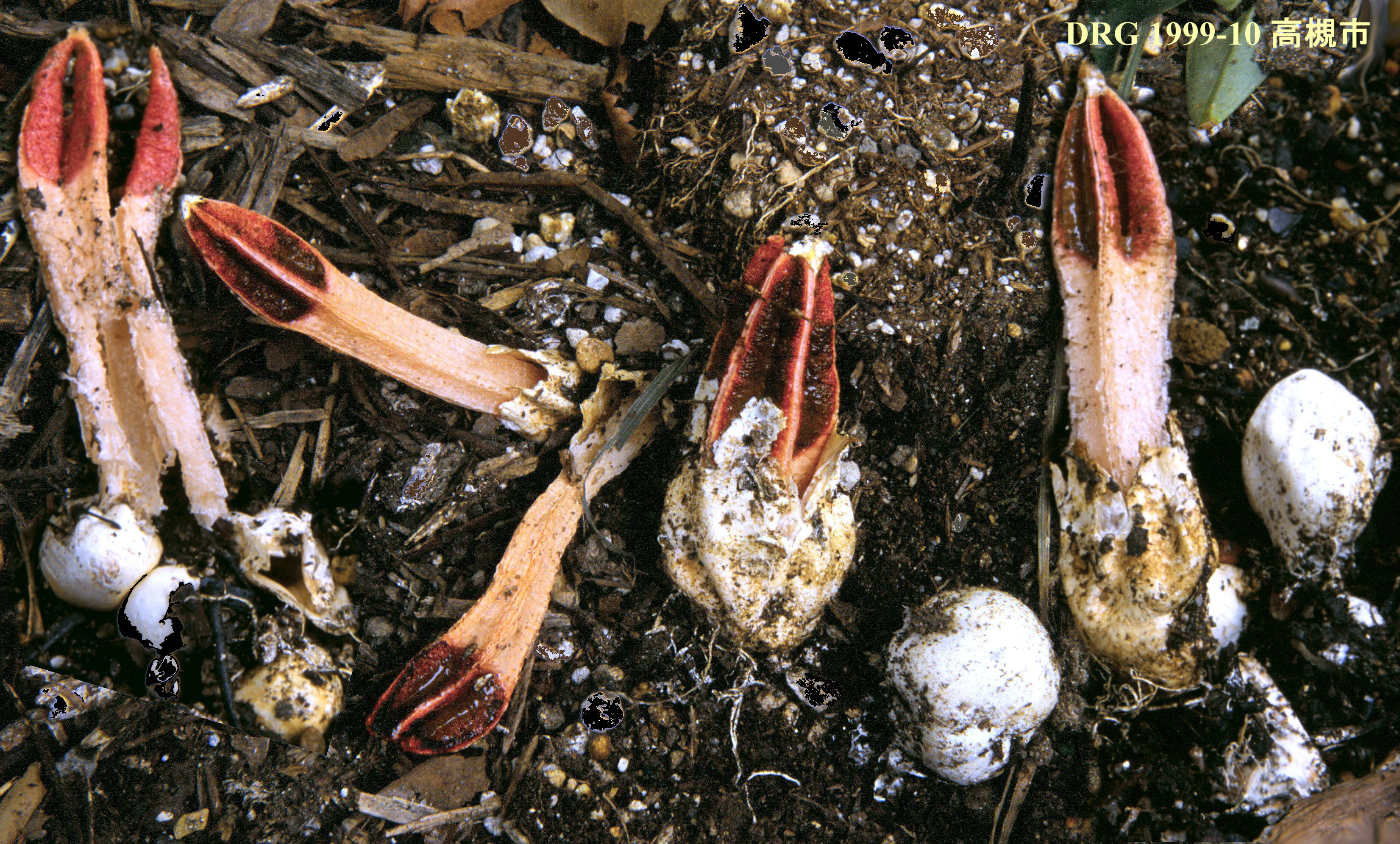 En grand nombre sur chablis d'écorce en début d'automne subtropical (Parc, Japon, Osaka)